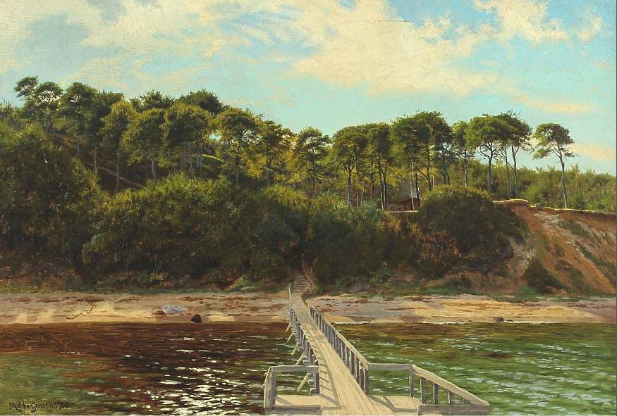 Kystlandskab ved Moesgård